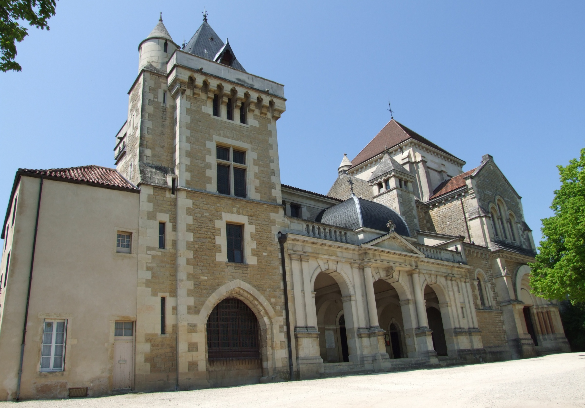 Maison natale de Saint Bernard de Clarivaux, Fontaine-lès-Dijon, Côte-d'Or, Bourgogne,FRANCE